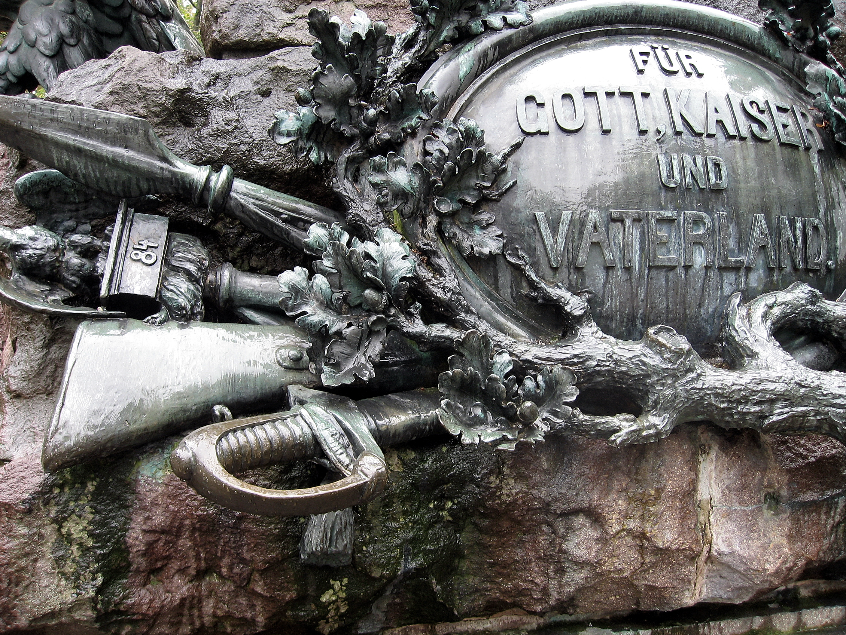 Österreich, Innsbruck, Bergisel, Andreas-Hofer-Denkmal, Bildhauer: Heinrich Natter